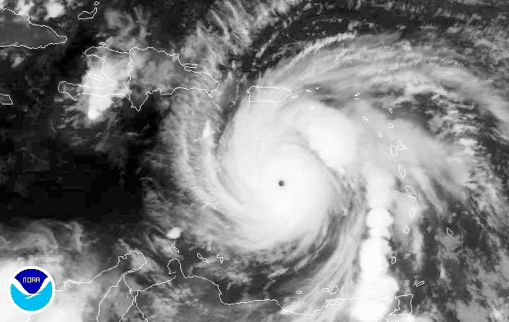 Le cyclone Dean entre dans les Caraïbes